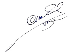 توقيع إميل سيوران.